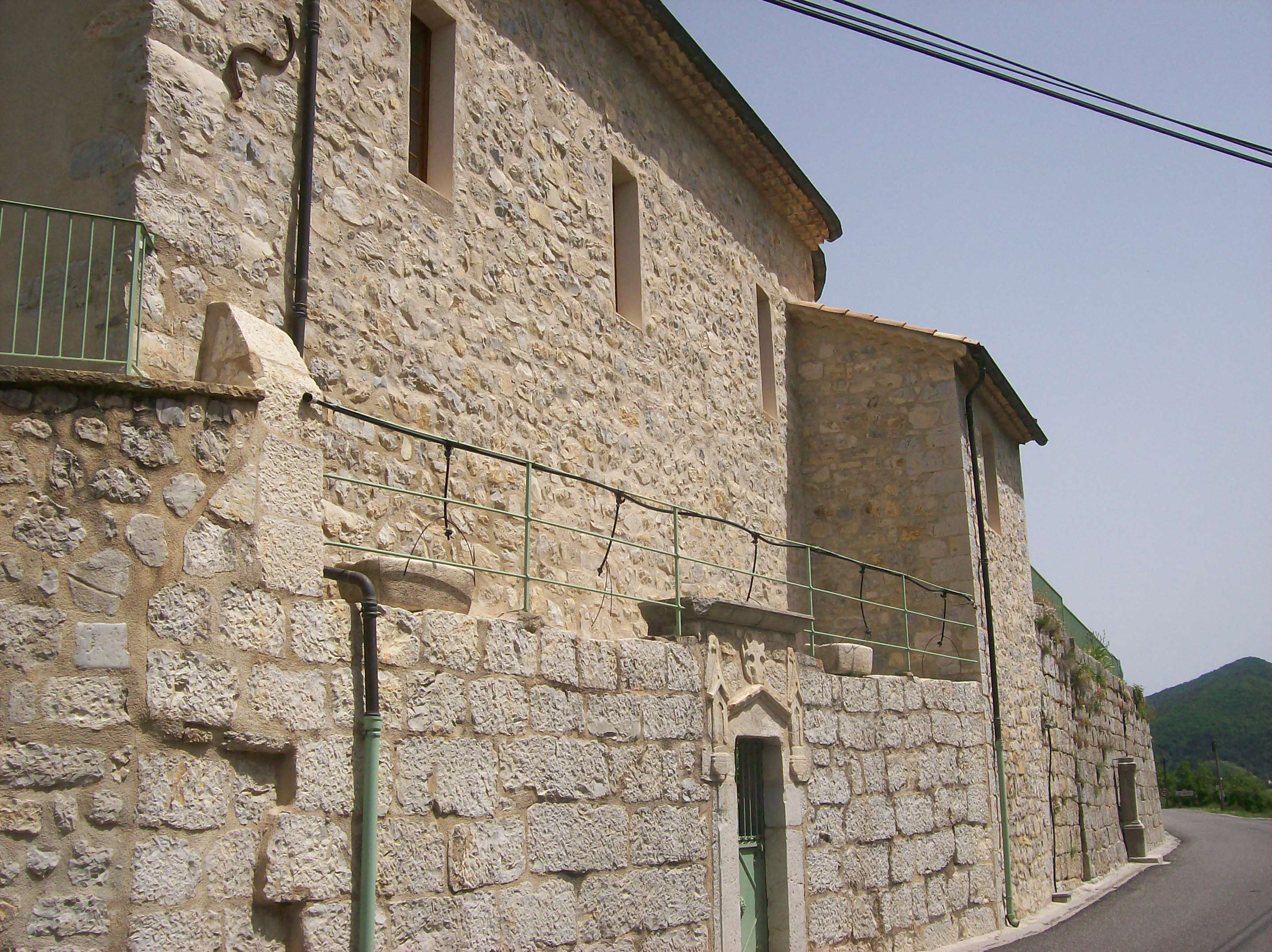 Vue de l'église du hameau des Bégües (commune de Sainte-Colombe) depuis la route départementale 30